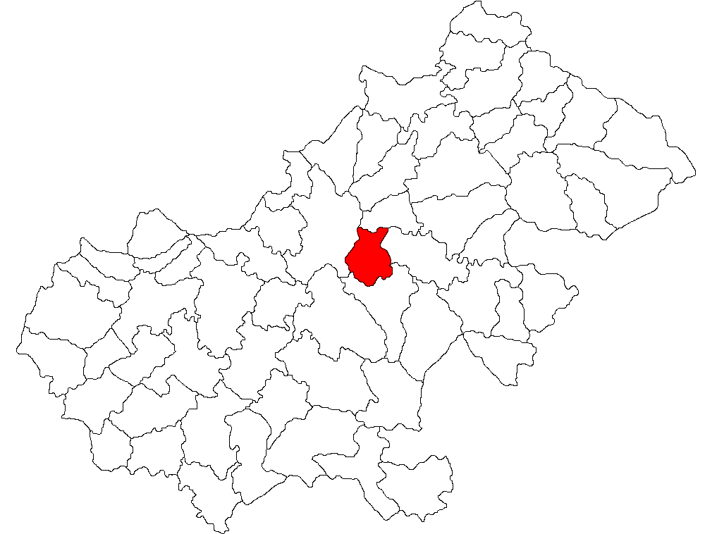 Categorie:Hărţi ale judeţului Satu Mare